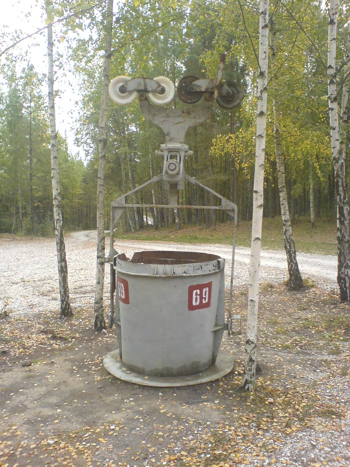 linbanekorg vid forsby kalkbrott